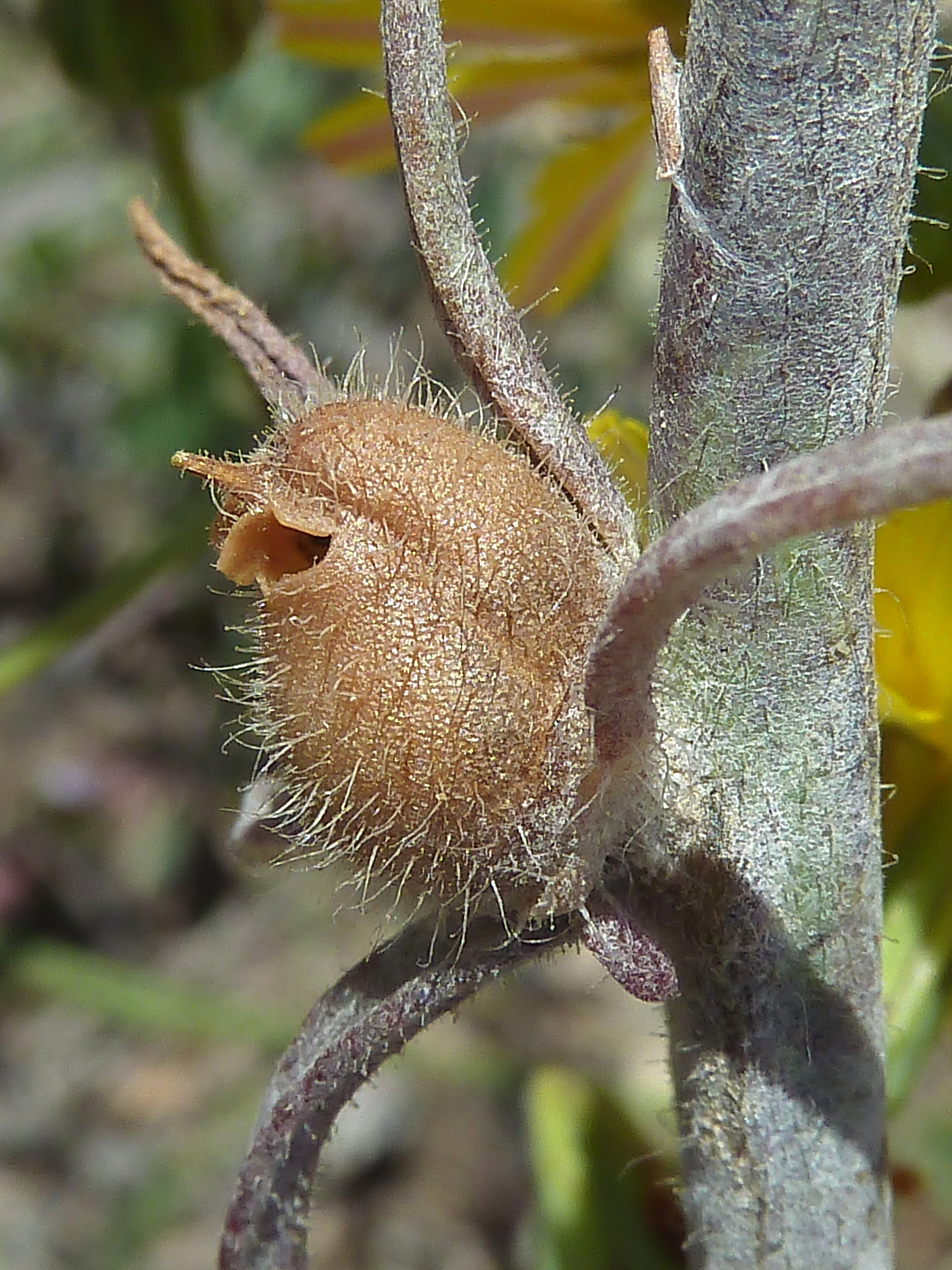 Misopates orontium (becerrilla, dragoncillo) - Capsula madura in situ. Camino de la Acequia de Cox, Albatera, Provincia de Alicante (España).